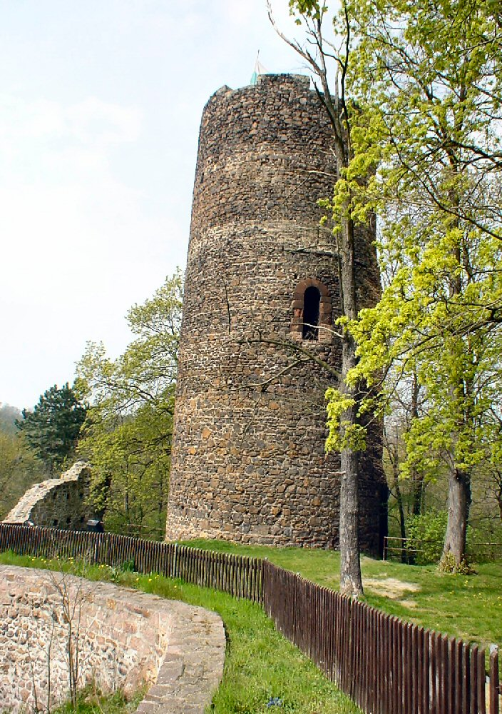 eigenes Foto von 2004, Public Domain Bergfried der Burg Kohren Mewes 06:55, 14. Apr 2005 (CEST)